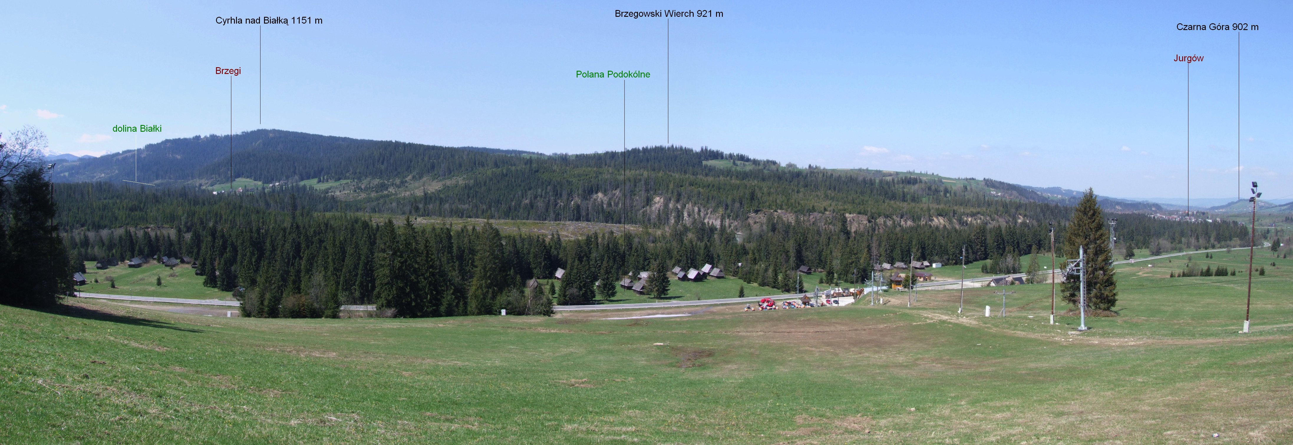 Widok ze stoków zjazdowych nad Jurgowem